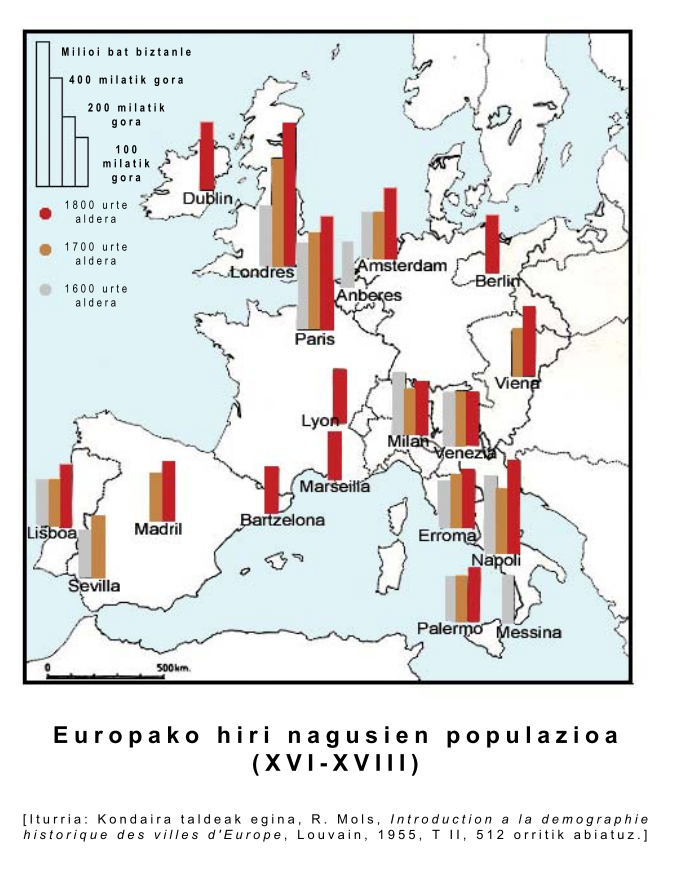 Europako hiri nagusien populazioa (XVI-XVIII), UEUren kondaira.eus webgunetik hartua.